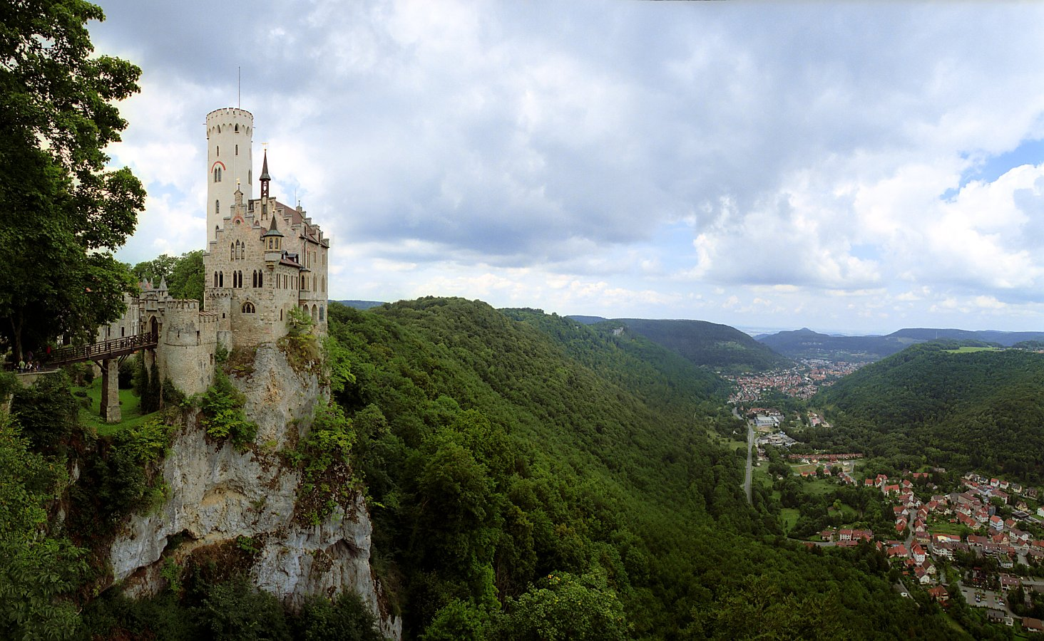 Schloß Lichtenstein in Baden-Württemberg, am hinteren Tal-Ende der Ort Lichtenstein, im Vordergrund der Ortsteil Honau